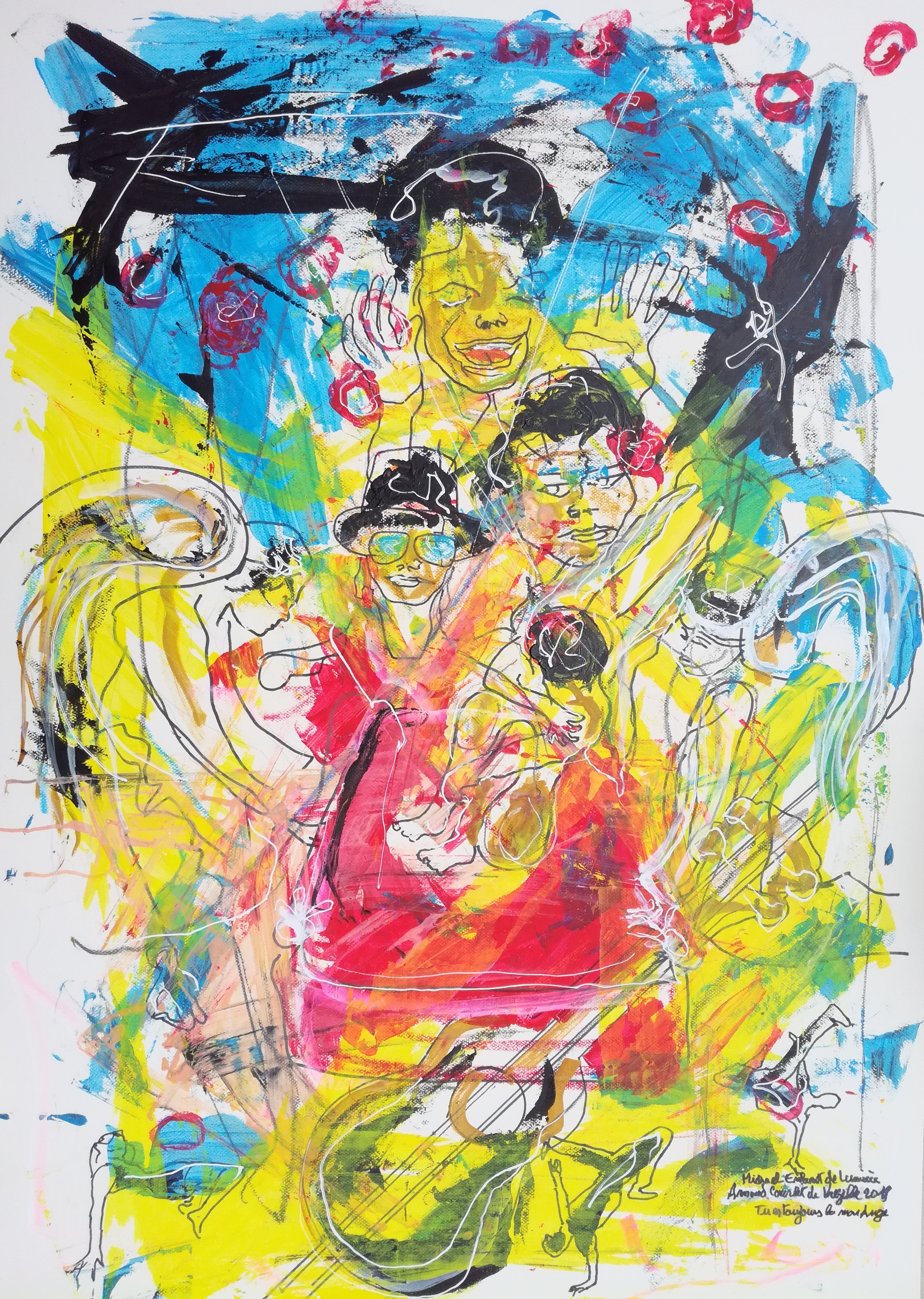 Peinture du peintre Arnaud Courlet de Vregille représentant Michael Jackson